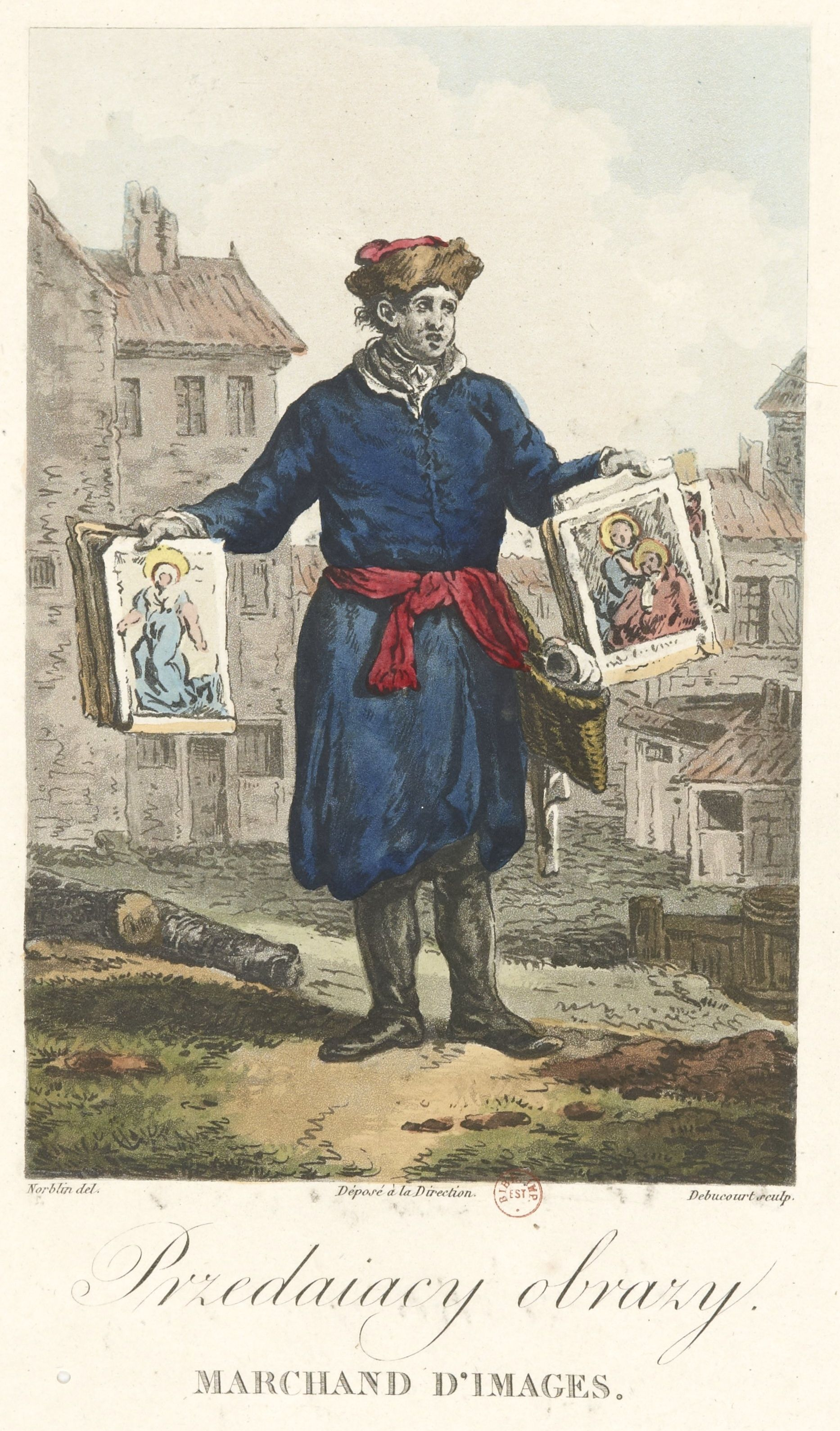 Продавец рисунков